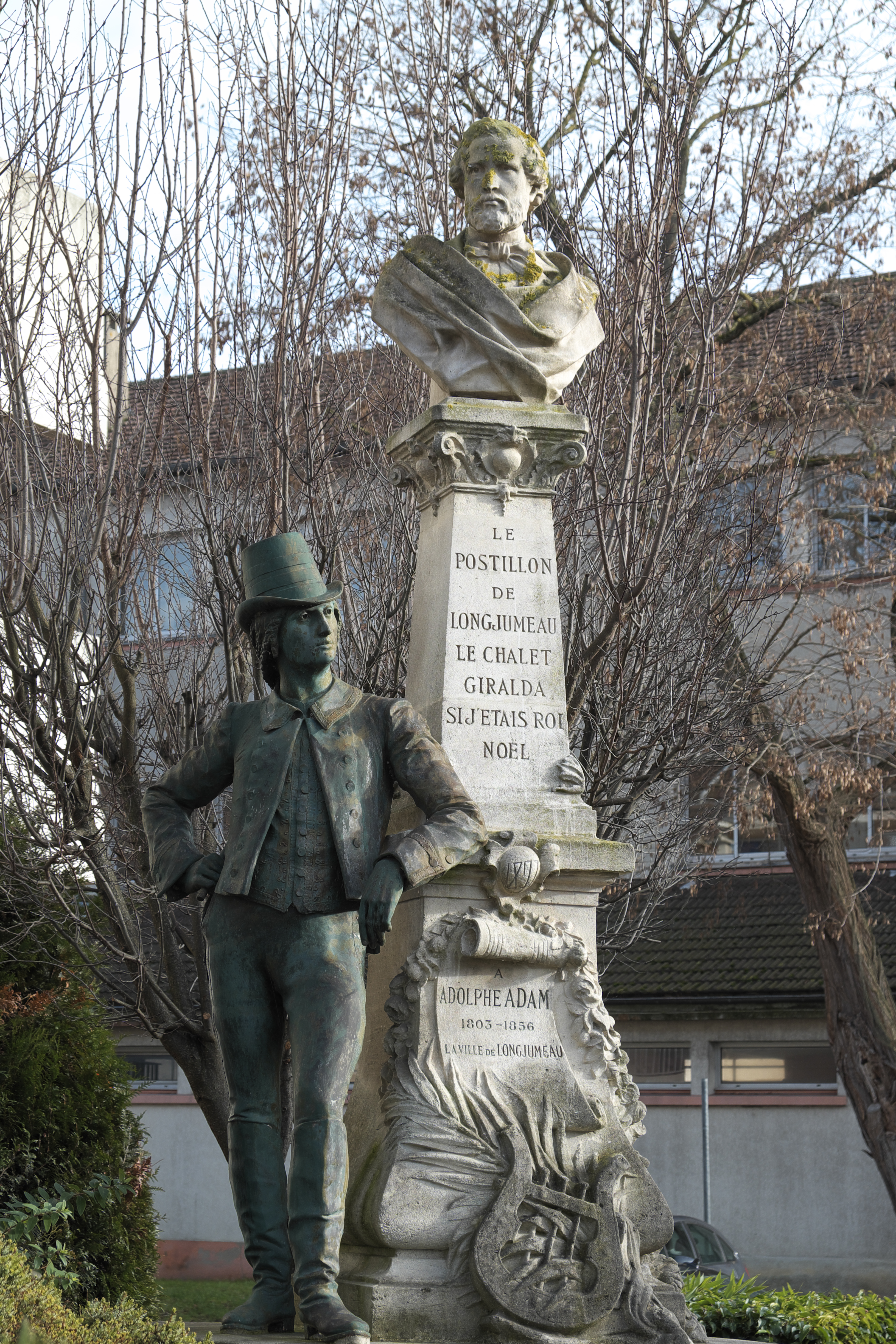 Le Postillon de Longjumeau, Denkmal für Adolphe Adam in Longjumeau im Département Essonne (Île-de-France/Frankreich)